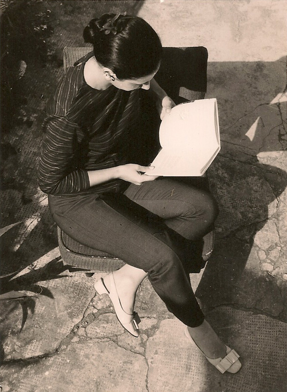 maria jose giglio, casa do escritor, cde, literatura, poeta, poesia, gatos, bazar, jornal, cds, cde